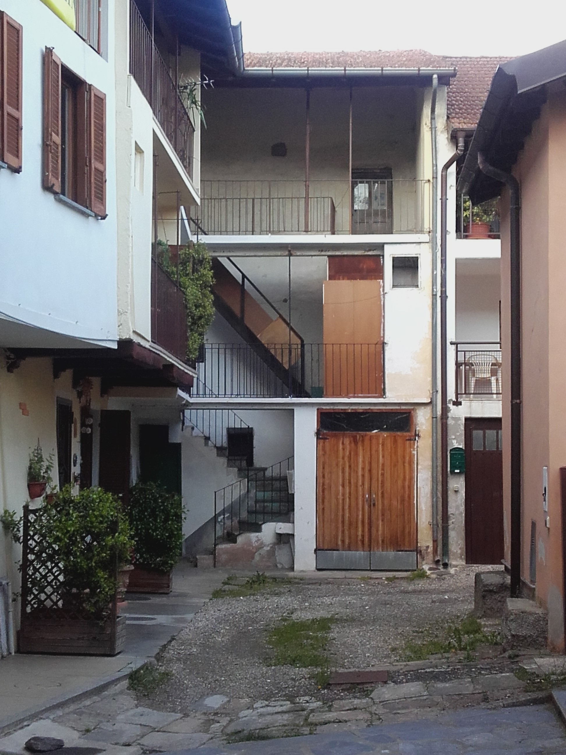 La casa di Quirino Besati in via Milazzo a Grantola